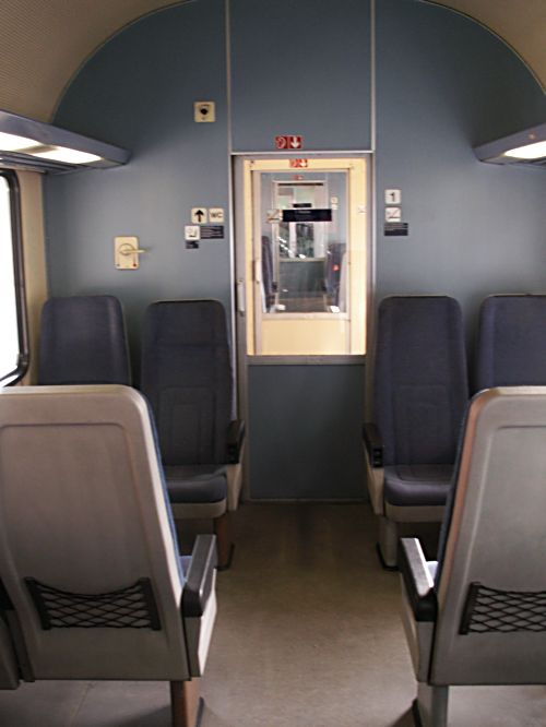 Stadtexpress